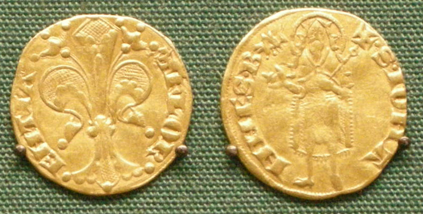 Fiorini d'oro di firenze, 1252-1303